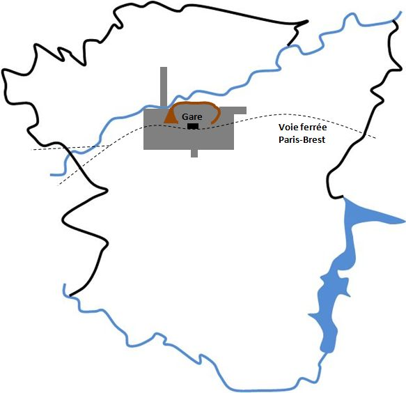 Vitré au milieu du XIXe siècle